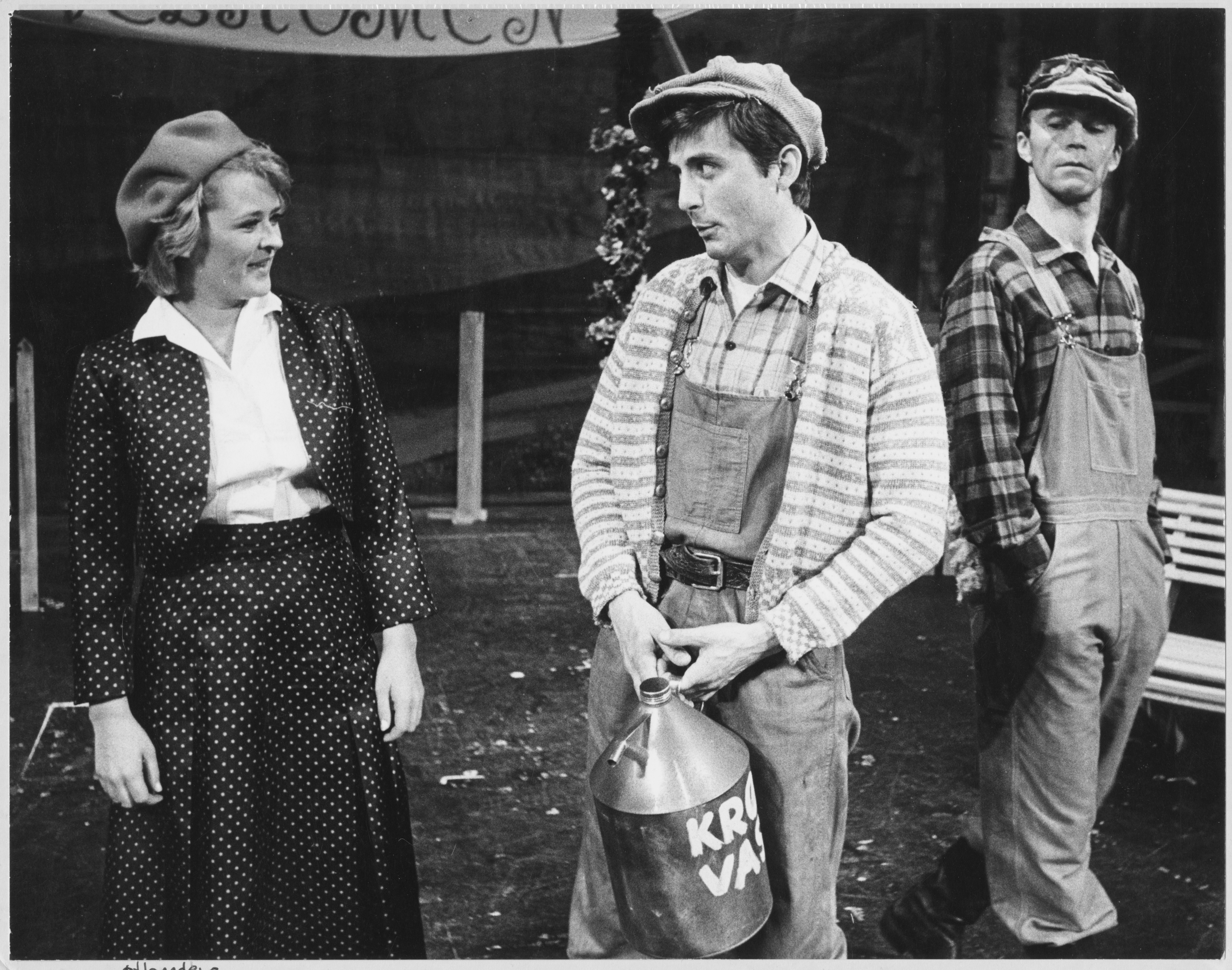 Fra v.: Kirsti Sparboe som Gunvor Smikkstugun, Arne O. Reitan som Hjalmar og John Yngvar Fearnley som Martin i Trøndelag teaters oppsetning av musikalen Trost i taklampa. Tekst: Alf Prøysen og Asbjørn Toms. Musikk: Finn Ludt. Premieredato: 9. mai 1975